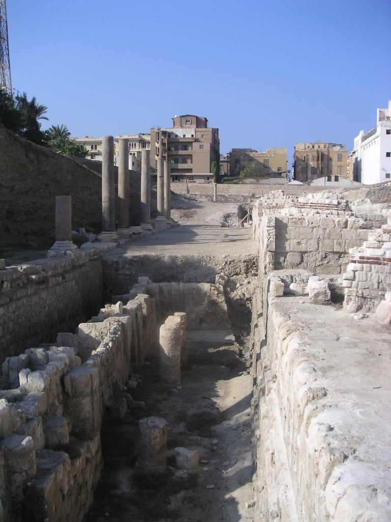 Vue des ruines de l'Alexandrie antique dans le quartier de Kom el-Dik ; une rue bordée de colonnades a été dégagée sur plusieurs niveaux archéologiques, le niveau romain avec les colonnes encore debout, le niveau ptolémaïque qui apparaît en dessous.